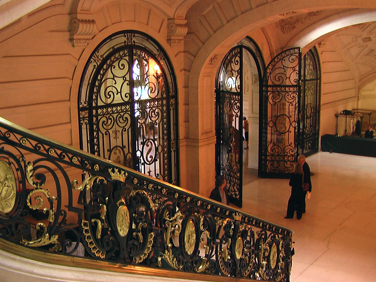 À La Sorbonne.